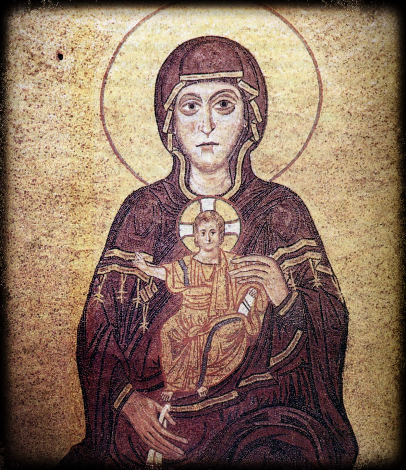 Αγία Σοφία Θεσσαλονίκης Παναγία ένθρονη 11ου ή στις αρχές του 12ου αιώνα Θεσσαλονικιώτικο εργαστήριο